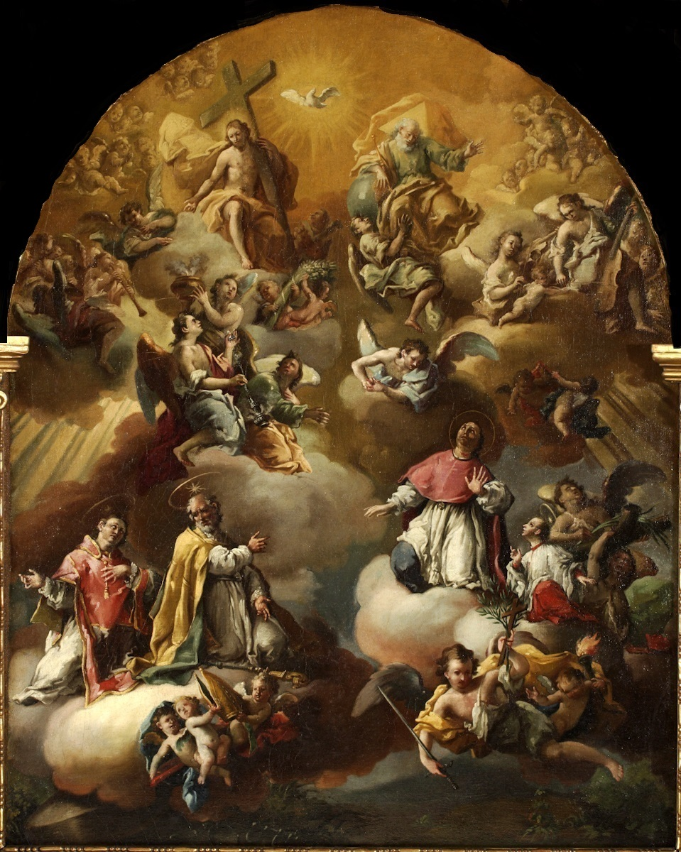 La obra representa a San Valero, San Vicente Mártir, San Pedro Arbués y Santo Dominguito de Val.